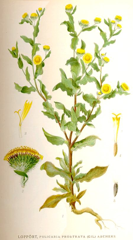 Loppört, Pulicaria vulgaris Gaertn., syn. Pulicaria prostrata (Gil.) Aschers.